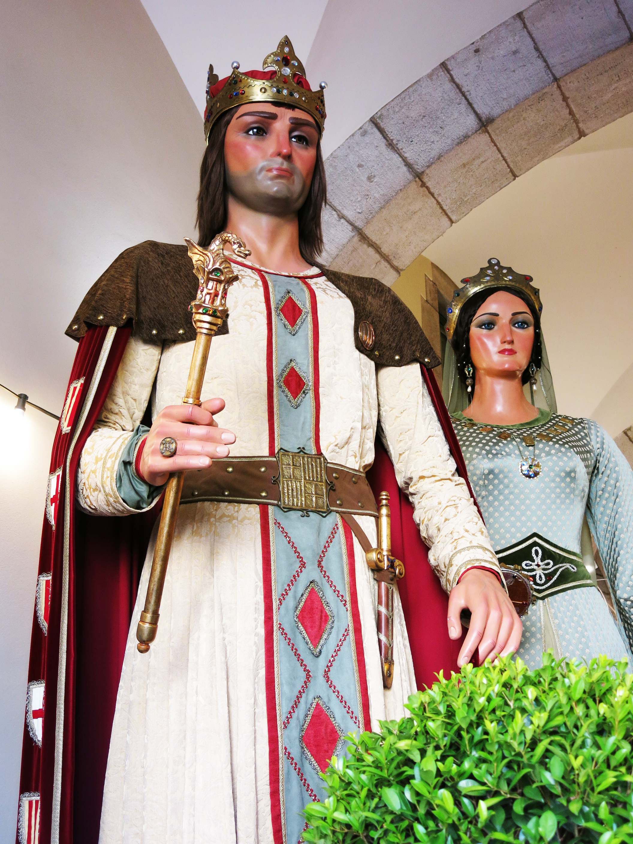 Gegants de la Ciutat (Palau de la Virreina, Barcelona)